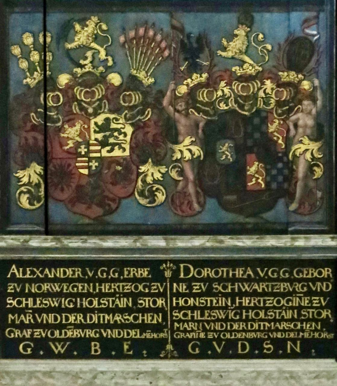 Dorothea af Schwarzburg-Sondershausen og Alexander af Slesvig-Holsten-Sønderborgs våben i Sønderborg Slotskapel